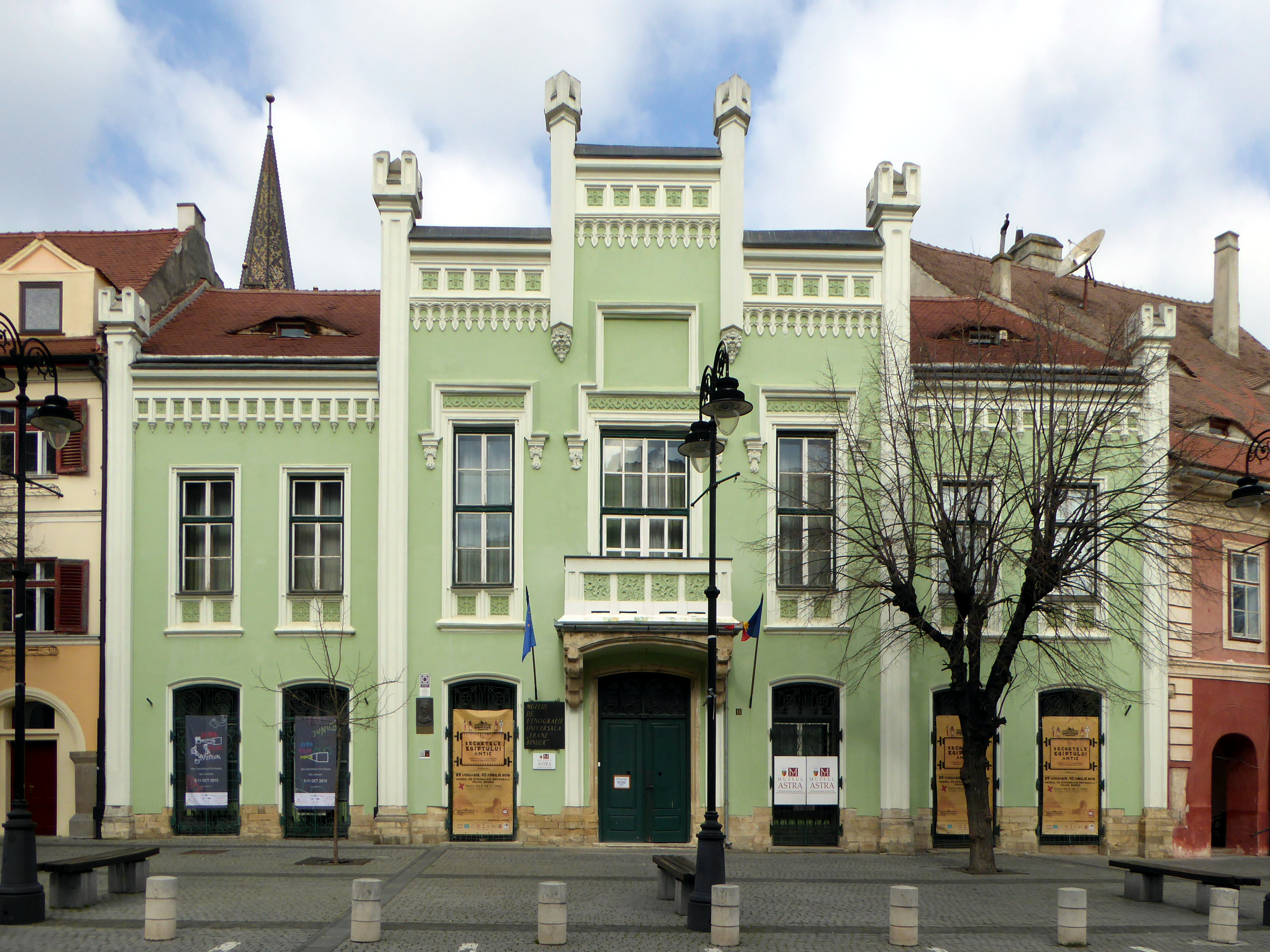 Franz-Binder-Museum für Völkerkunde in Hermannstadt (RO).